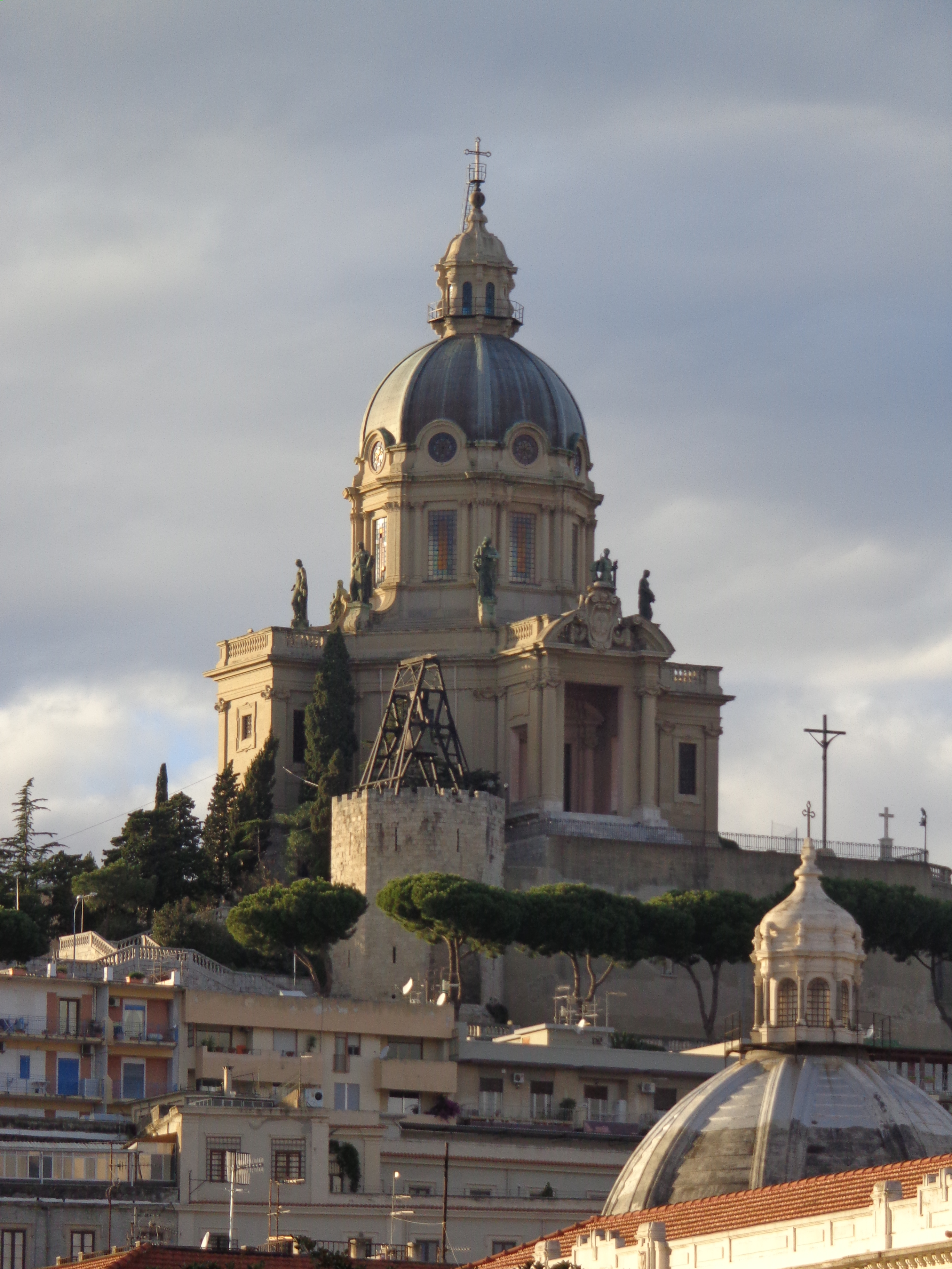 Tempio Votivo di Cristo Re, Messina